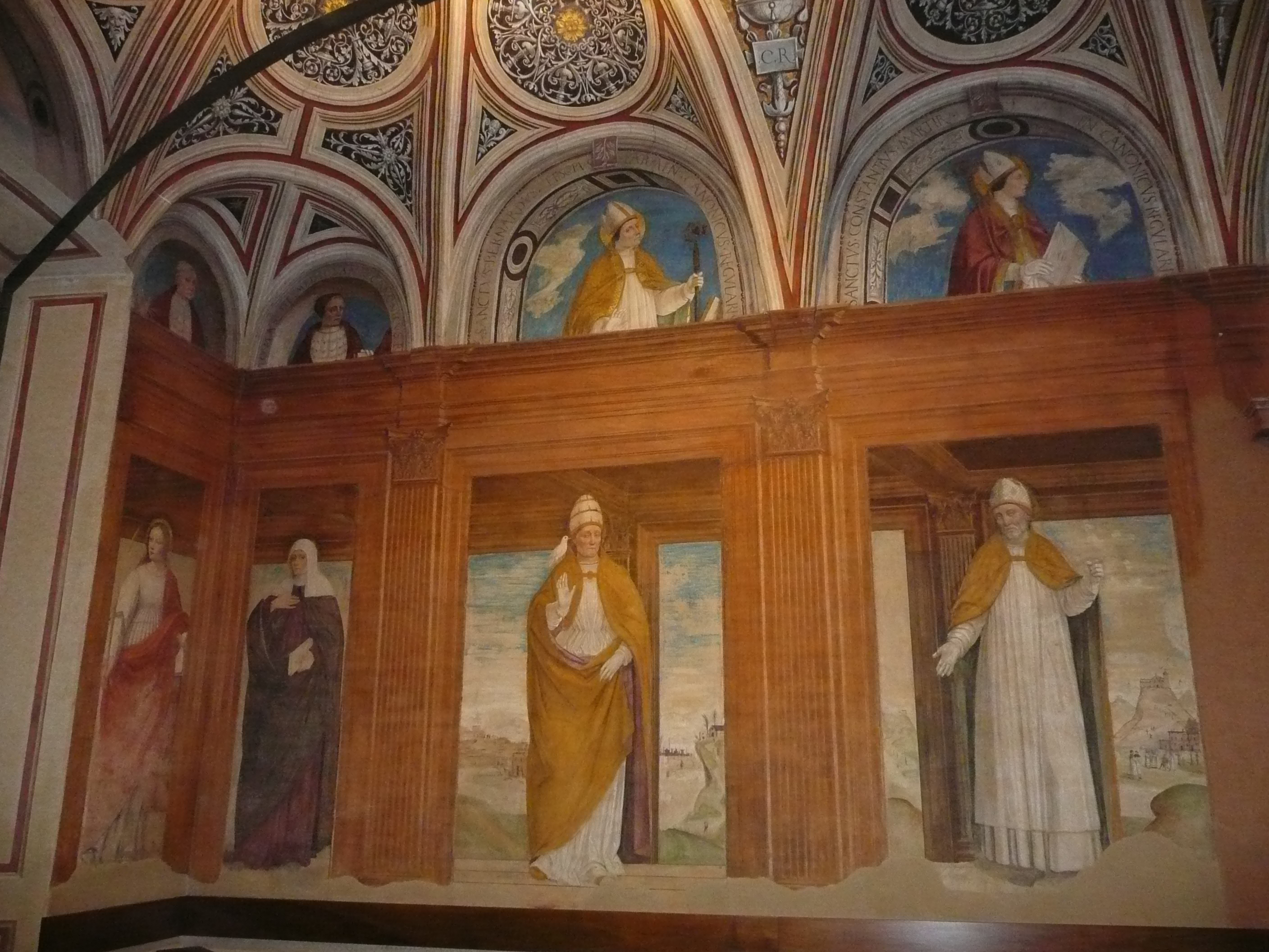 Milano, Basilica di Santa Maria della Passione, sala capitolare, affreschi di Ambrogio Bergognone, Santi e papi appartenenti all'ordine dei Canonici Lateranensi